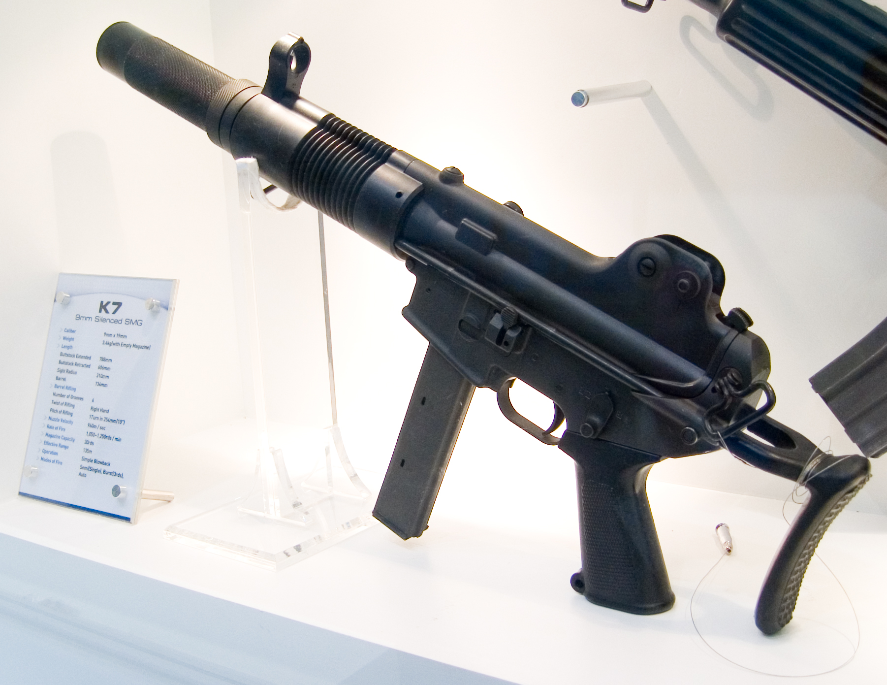 Daewoo K7 SMG at Defense Asia 2006